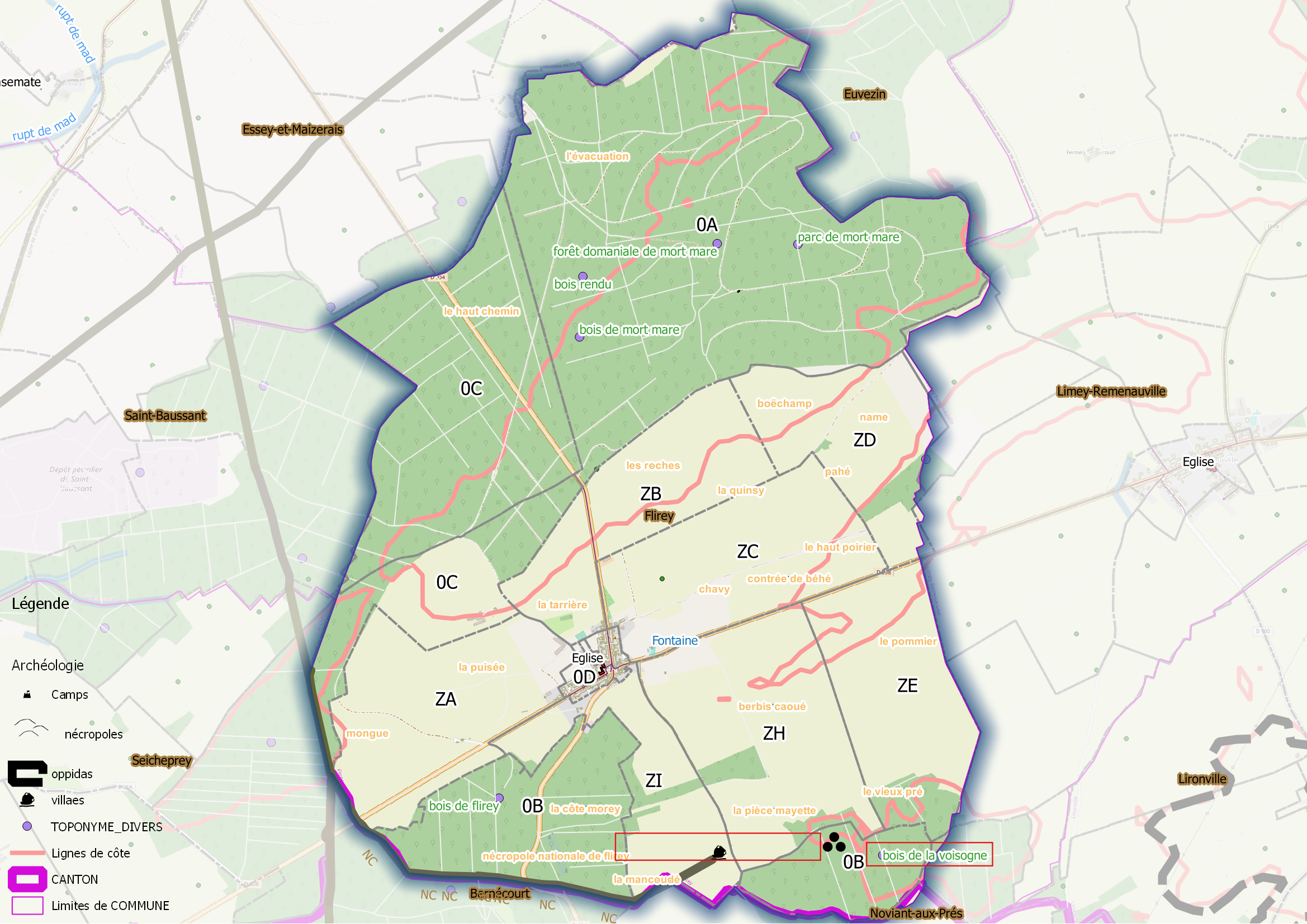 Flirey (ban communal) OSM et Qgis, mentions additionnelles